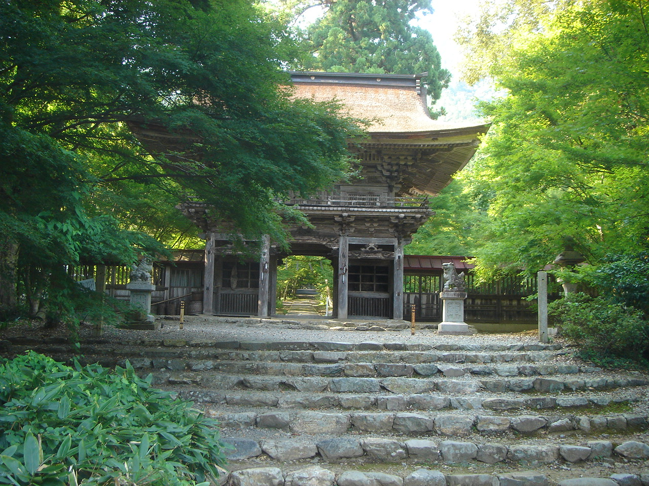 Oyada Jinjya(Shrine)(大矢田神社),Mino,Gifu,Japan(岐阜県美濃市)で撮影